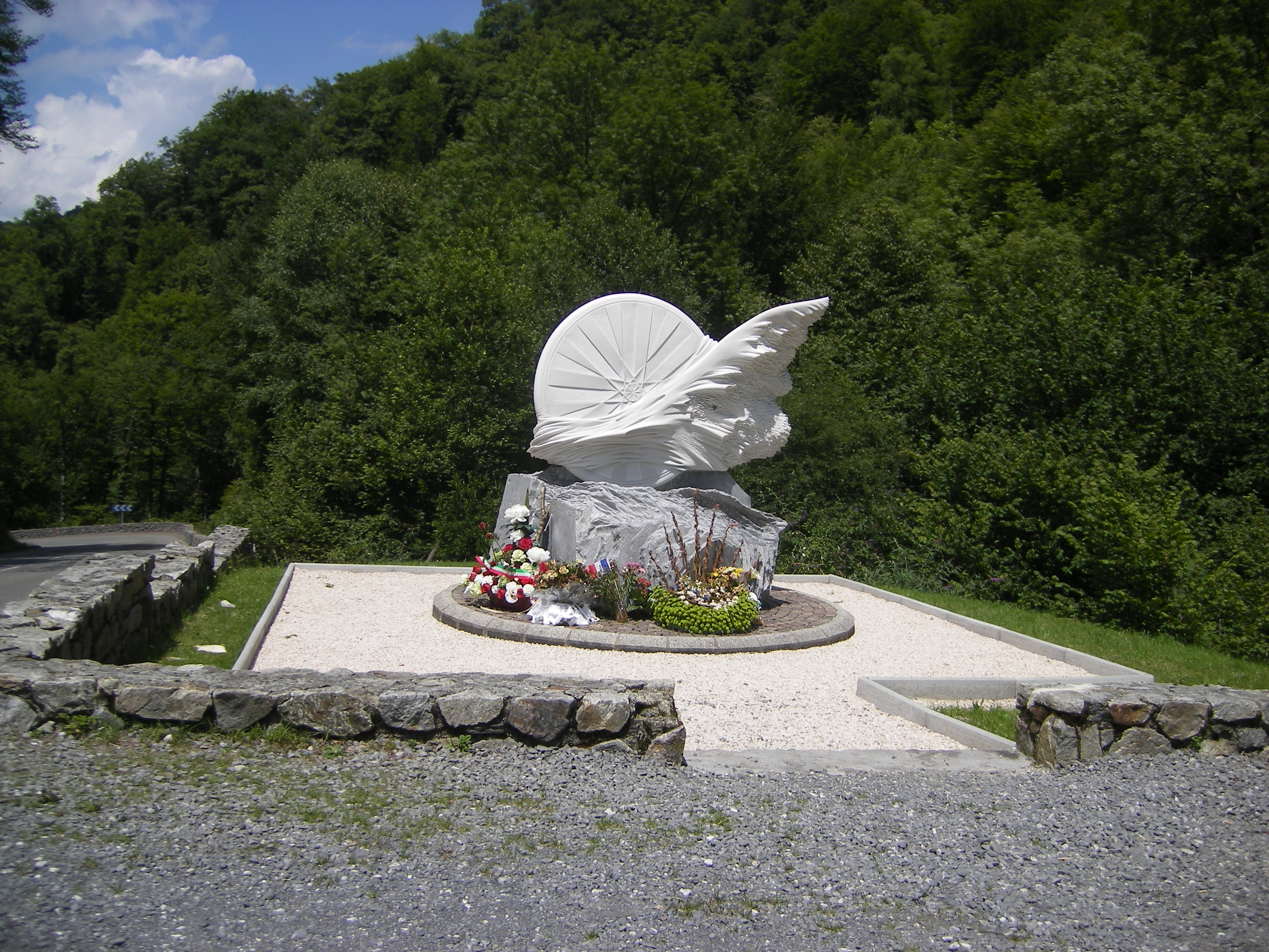 Stèle en hommage au coureur cycliste italien Fabio Casartelli, dans la montée du col de Portet d'Aspet, en Haute-Garonne.